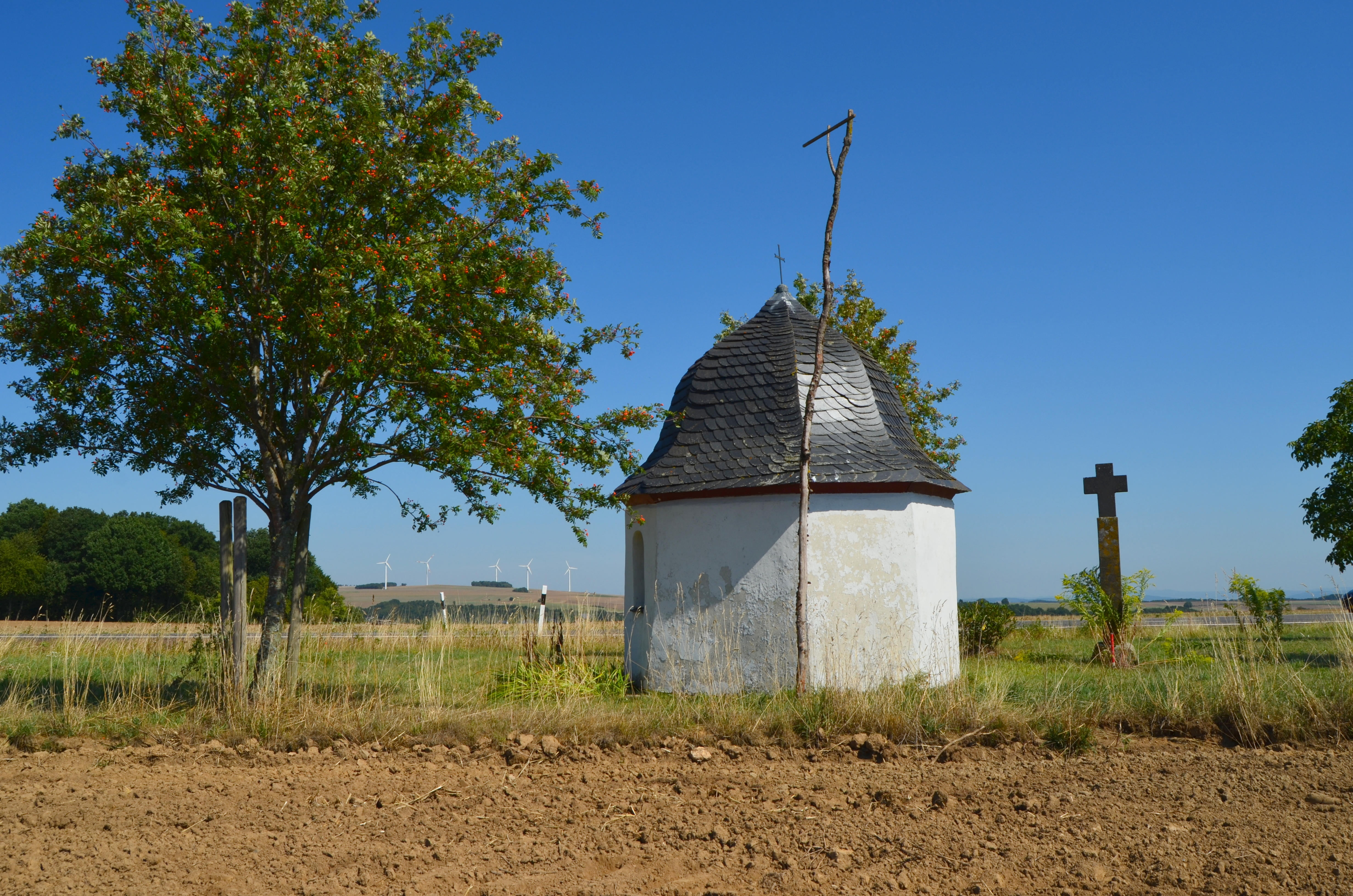 19e eeuwse wegkapel langs de L 108 tussen Hambuch en Binningen - 19e ieuwske weikapel oan de L 108 tusken Hambuch en Binningen